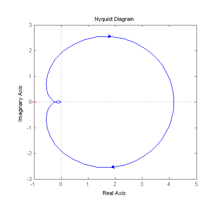 Nyquistdiagram